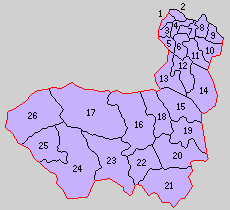 大分県下毛郡の町村制時点の町村。